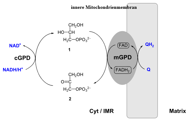 Глицерол-фосфатна совалка